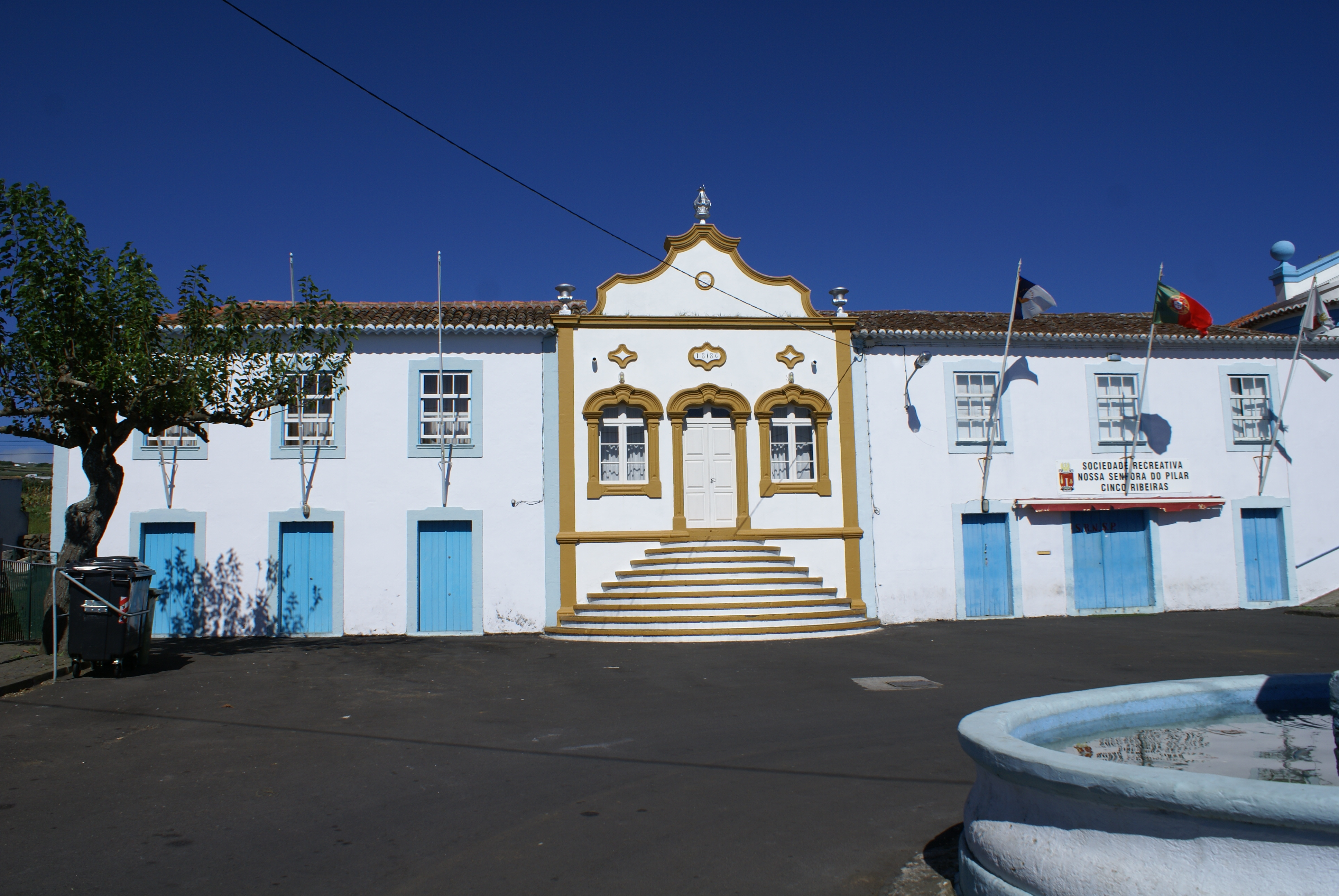 Império do Espírito Santo das Cinco Ribeiras, Angra do heroísmo, Terceira Açores, Arquivo de Villa Maria, ilha Terceira, Açores